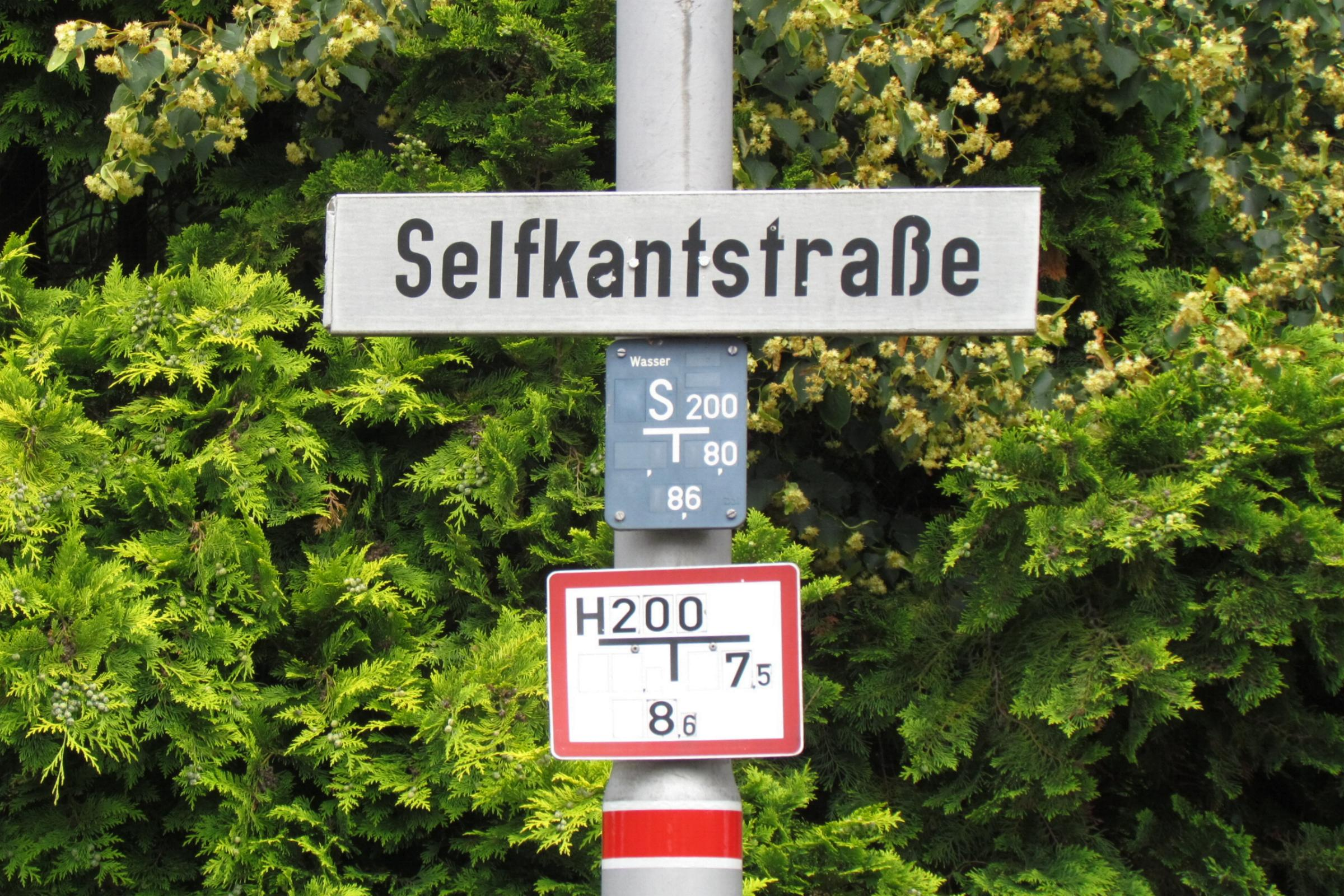 Heilder Straßenname